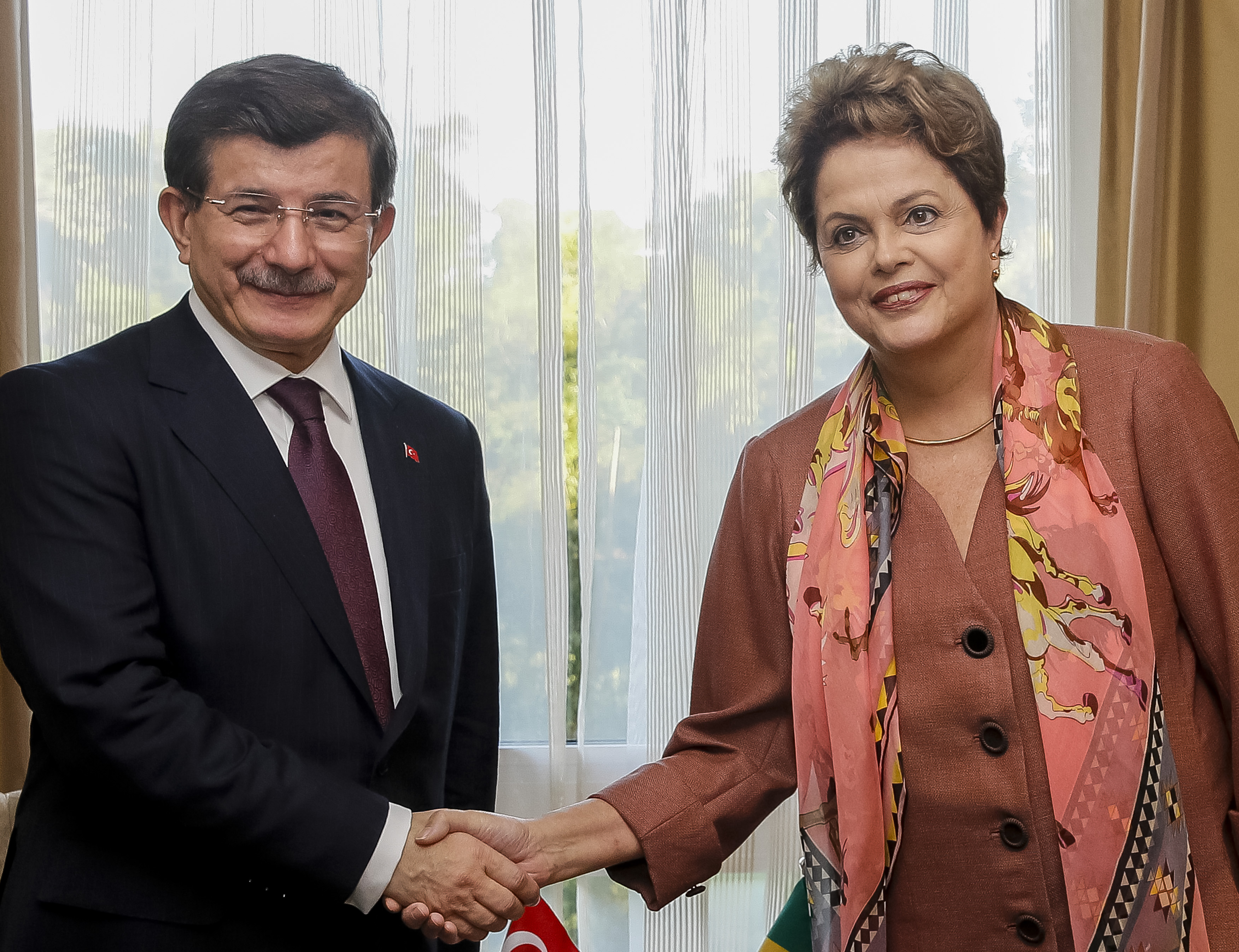 Brisbane - Austrália,14/11/2014. Presidenta Dilma Rousseff durante encontro bilateral com Primeiro-ministro da Turquia, Ahmet Davutoglu. Foto: Roberto Stuckert Filho/PR